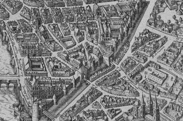 Vue de l'enceinte de Philippe Auguste Rive gauche au XVIIe siècle